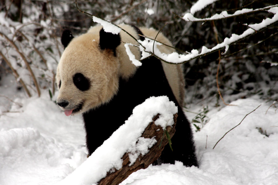 Panda bear